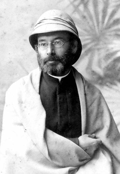 Domkapitular Dr. Sigmund Zimmern, Diözese Speyer